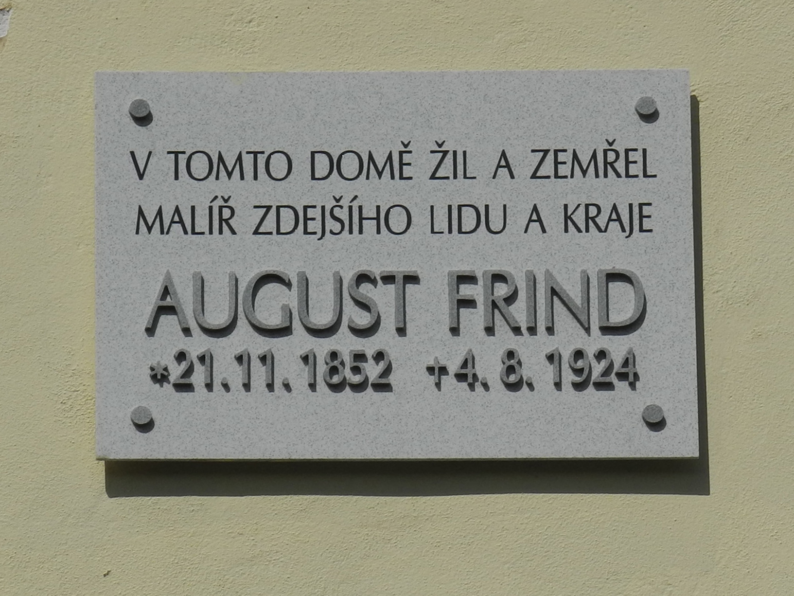 Tafel am Haus in Krásná Lípa, Smetanova 2, Wohn- und Sterbehaus des Malers August Frind (1852–1924)